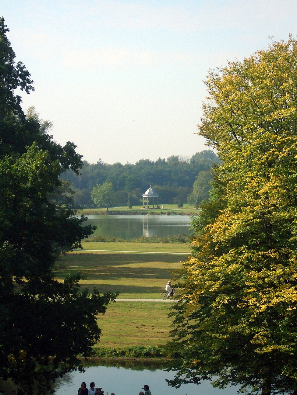 Blick vom Schloss Richmond zum Spielmannsteich mit Säulentempel.